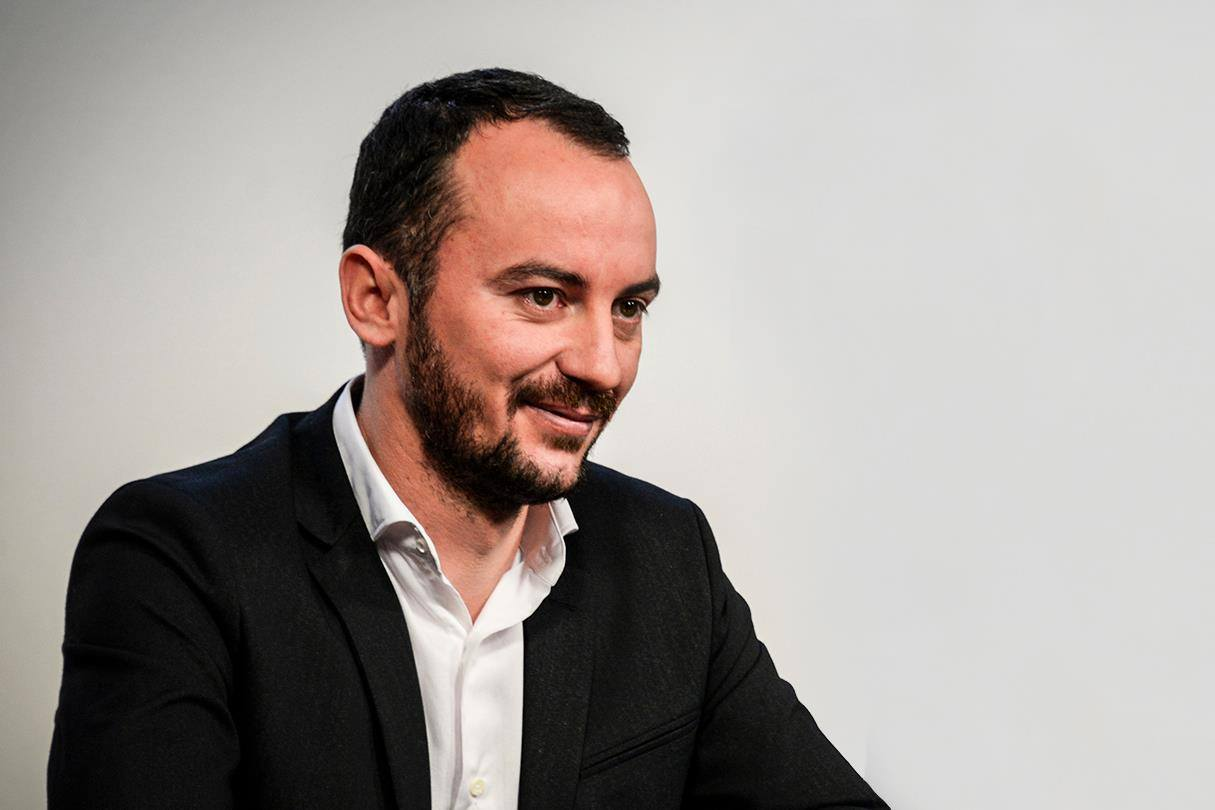 Sekretari organizativ i Levizjes Vetevendosje, Dardan Molliqaj.